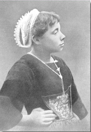 C'est une corleden avec brides. Elles sont relevées en forme d'anses et épinglées au sommet de la tête